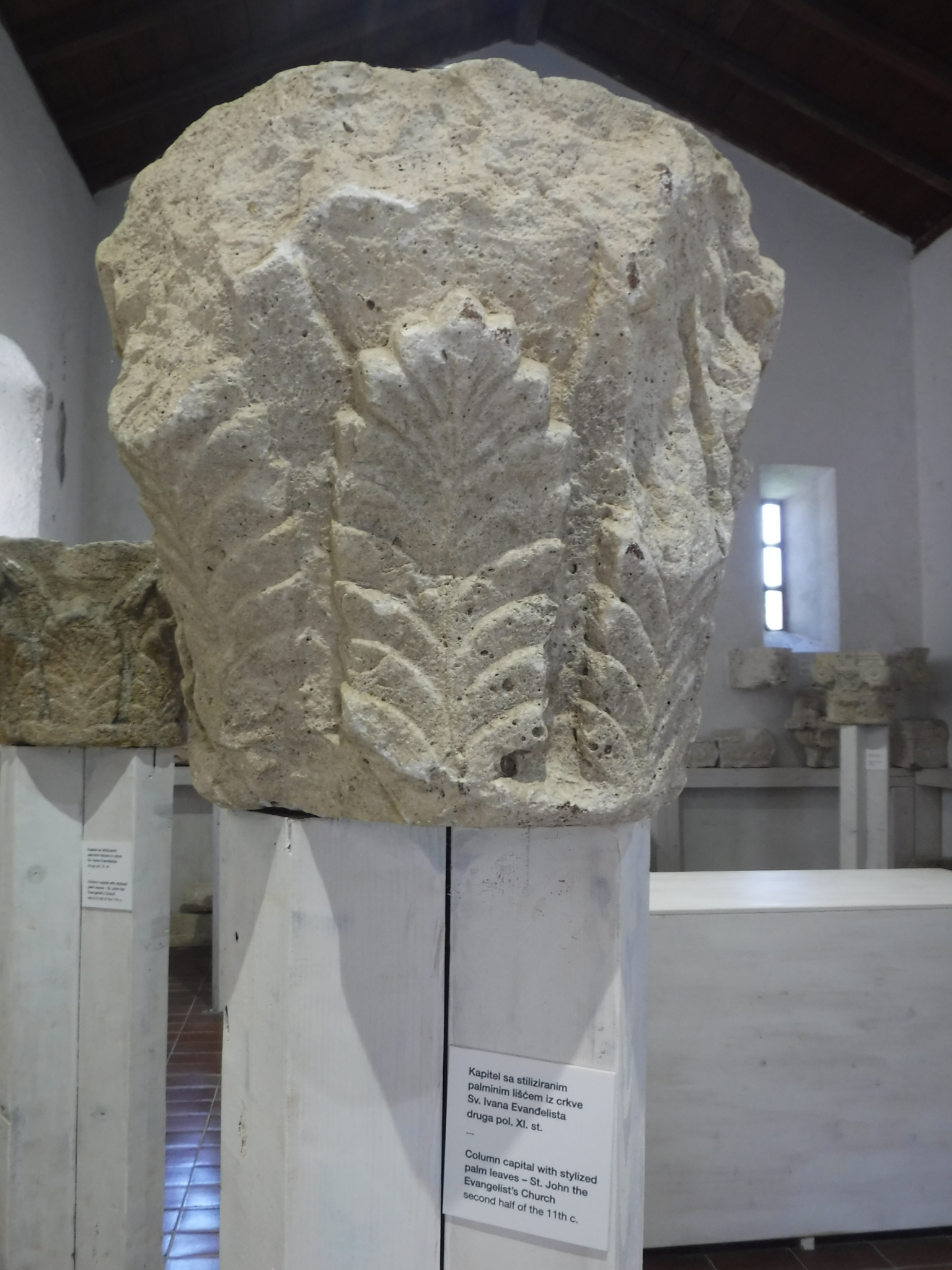 Kapitell der St. Johannes-Evangelist-Kirche auf Rab im dortigen Lapidarium